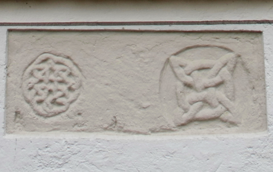 Katholische Pfarrkirche St. Peter und Paul in Sonderheim (Höchstädt an der Donau), spätromanische Spolien an der Außenmauer des Chores, vermutlich Teile eines Flechtbandfrieses